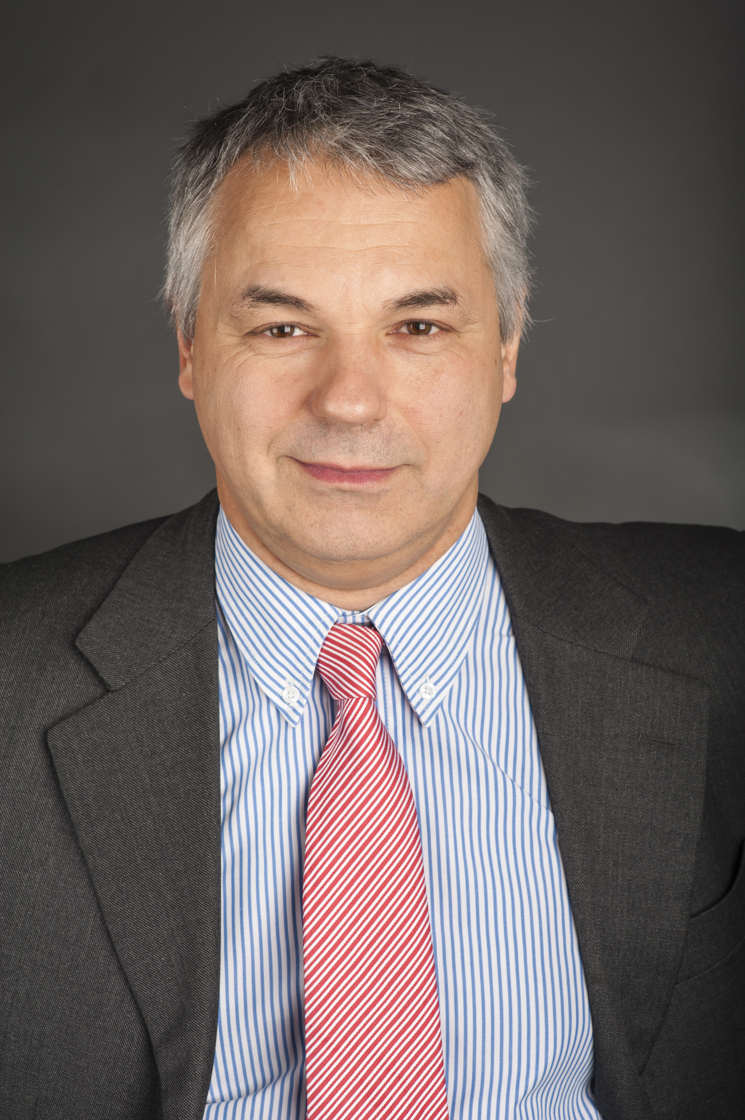 Niccoló Rinaldi